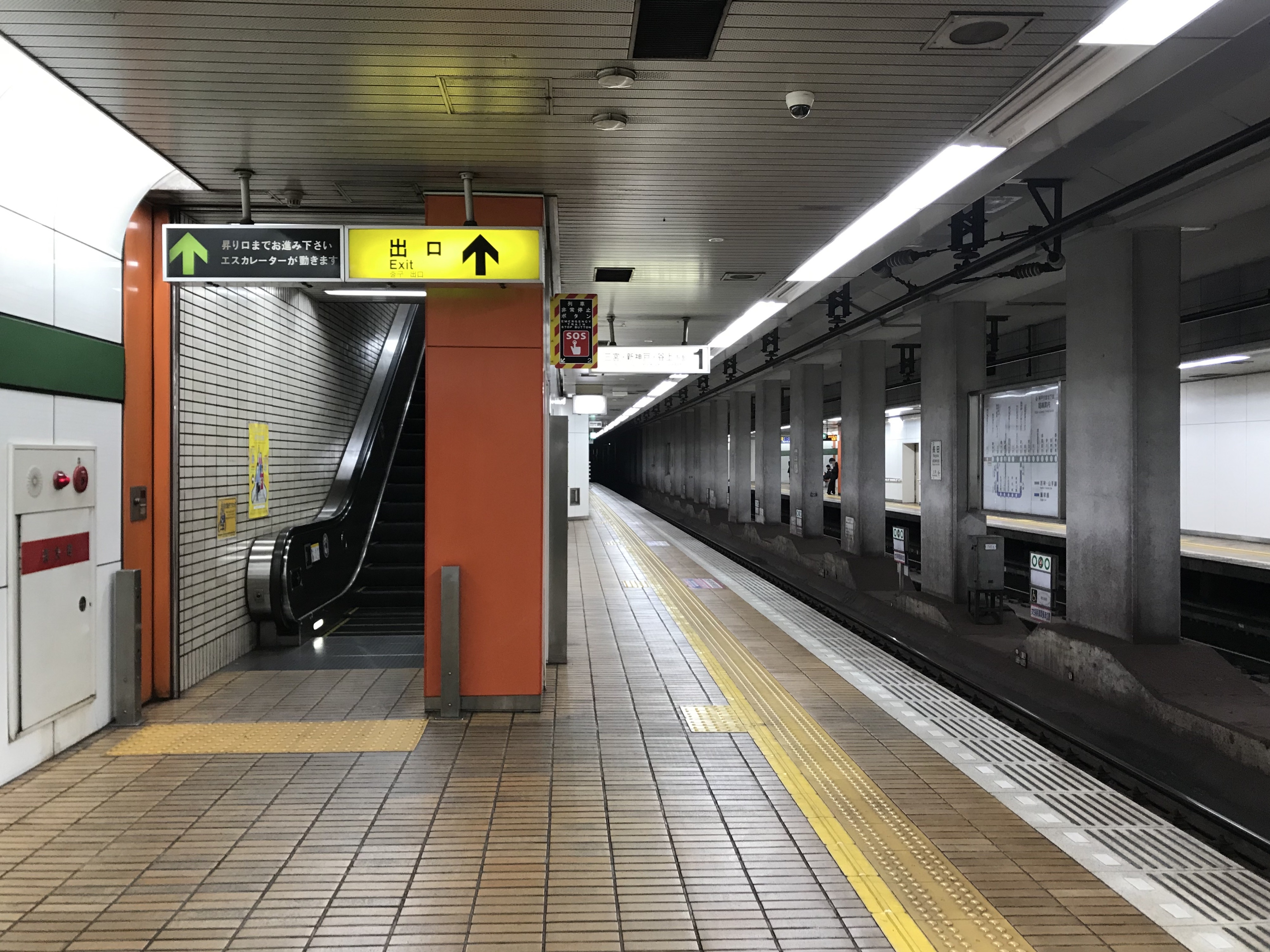 長田駅のホーム(奥は上沢方面)